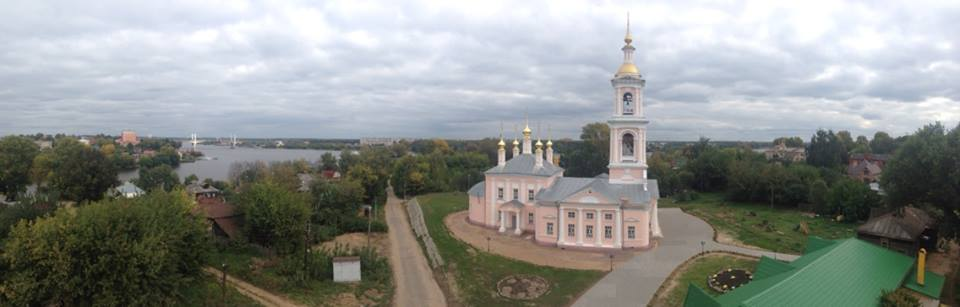 Храм Вознесения Господня в Кимрах, фотография с высоты